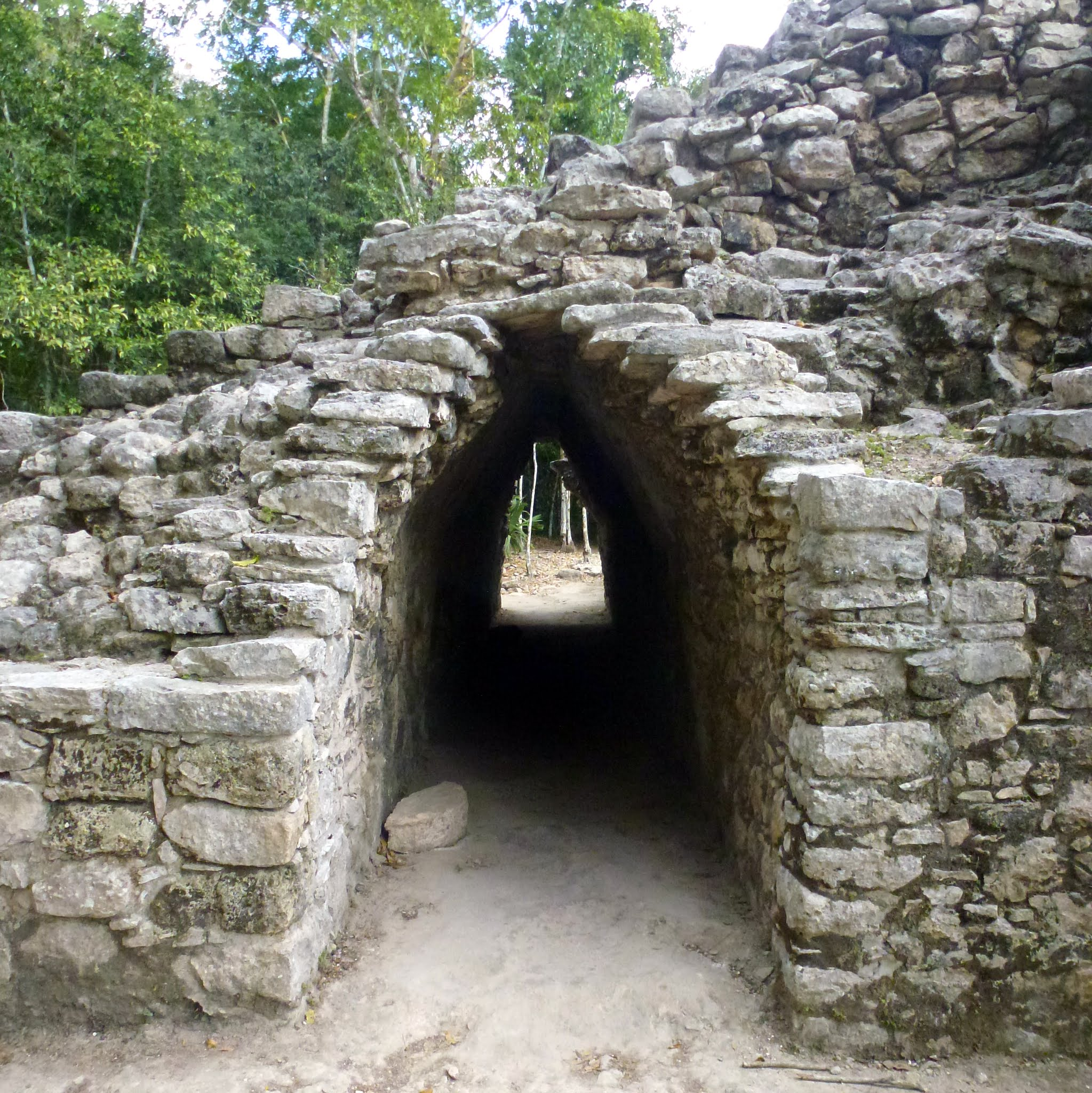 Coba